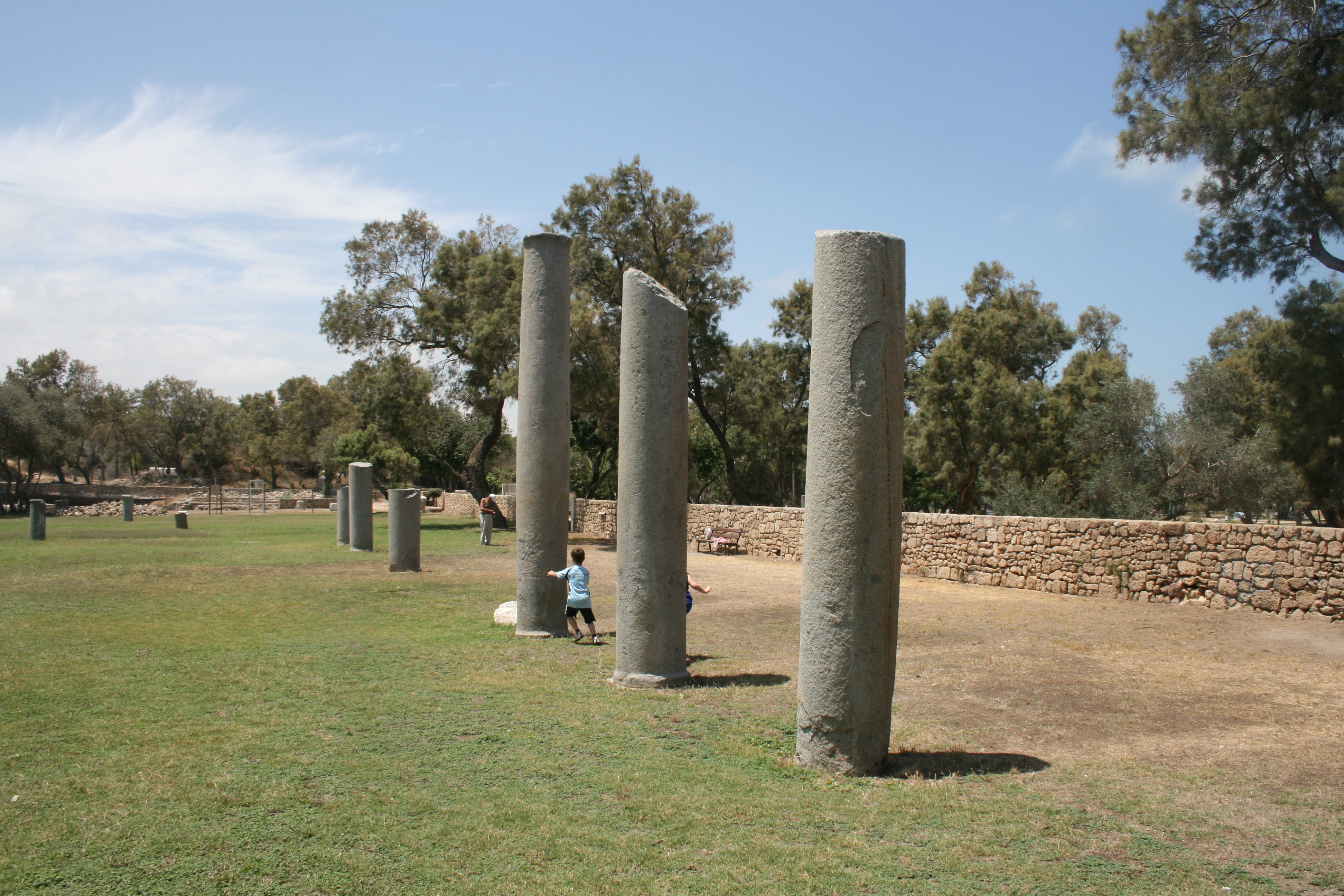 שרידי עיר מבוצרת (2 ק"מר). על קו חוף הים. בעיר נחשפו חומות, שער בנוי מלבנים, מקדשים, ומבנים מנומנטליים. ראשית החפירות החלו ע"י לידי סטנהוף 1815. כיום החפירות נערכות ע"י משלחת בראשות ל"א סטייגר.